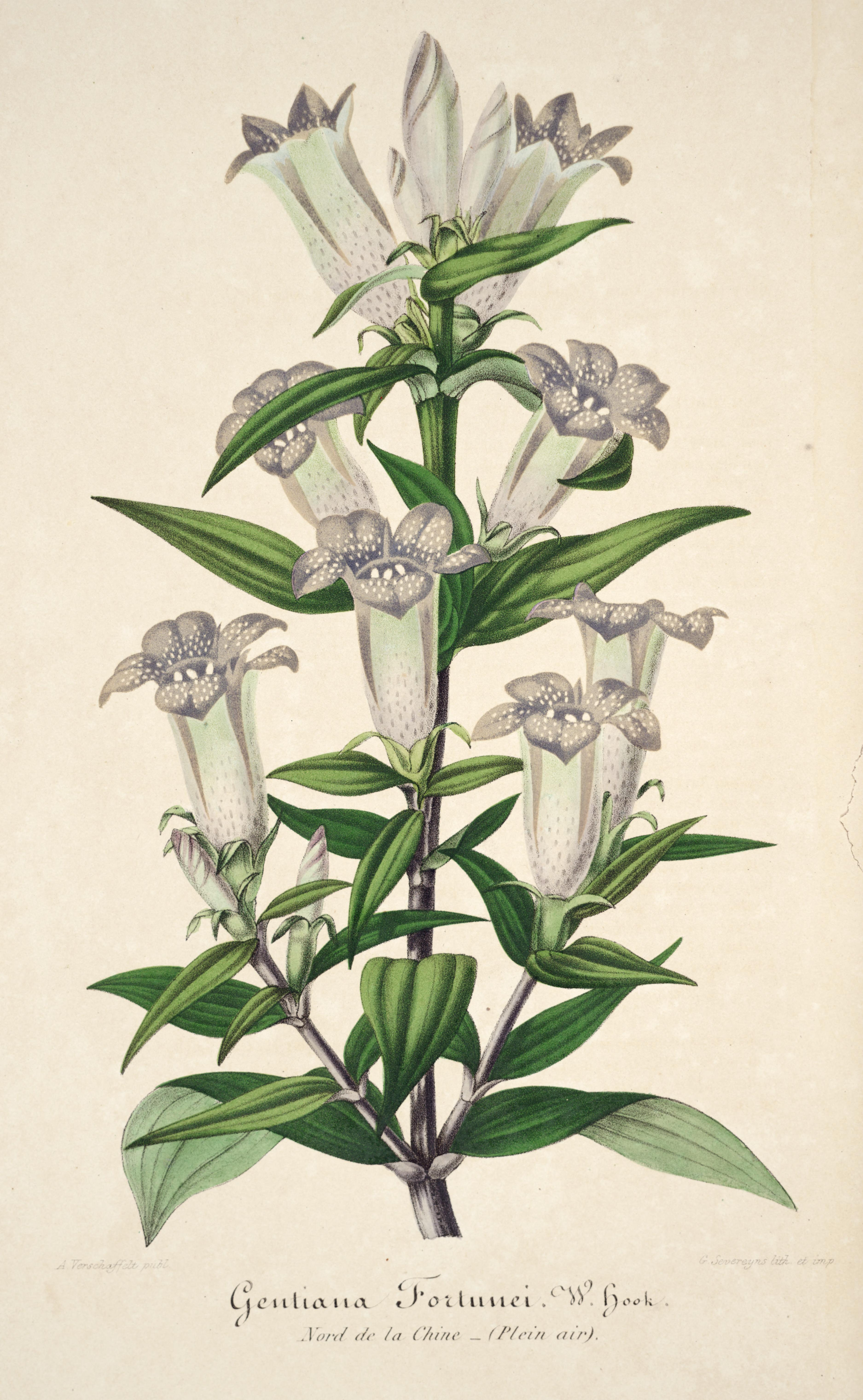 L'Illustration horticole : journal spécial des serres et des jardins, ou choix raisonné des plantes les plus intérressantes sous le rapport ornemental, comprenant leur histoire complete, leur description comparée, leur figure et leur culture /